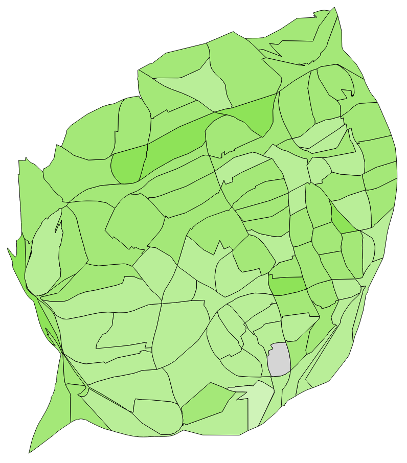 顏色對照表